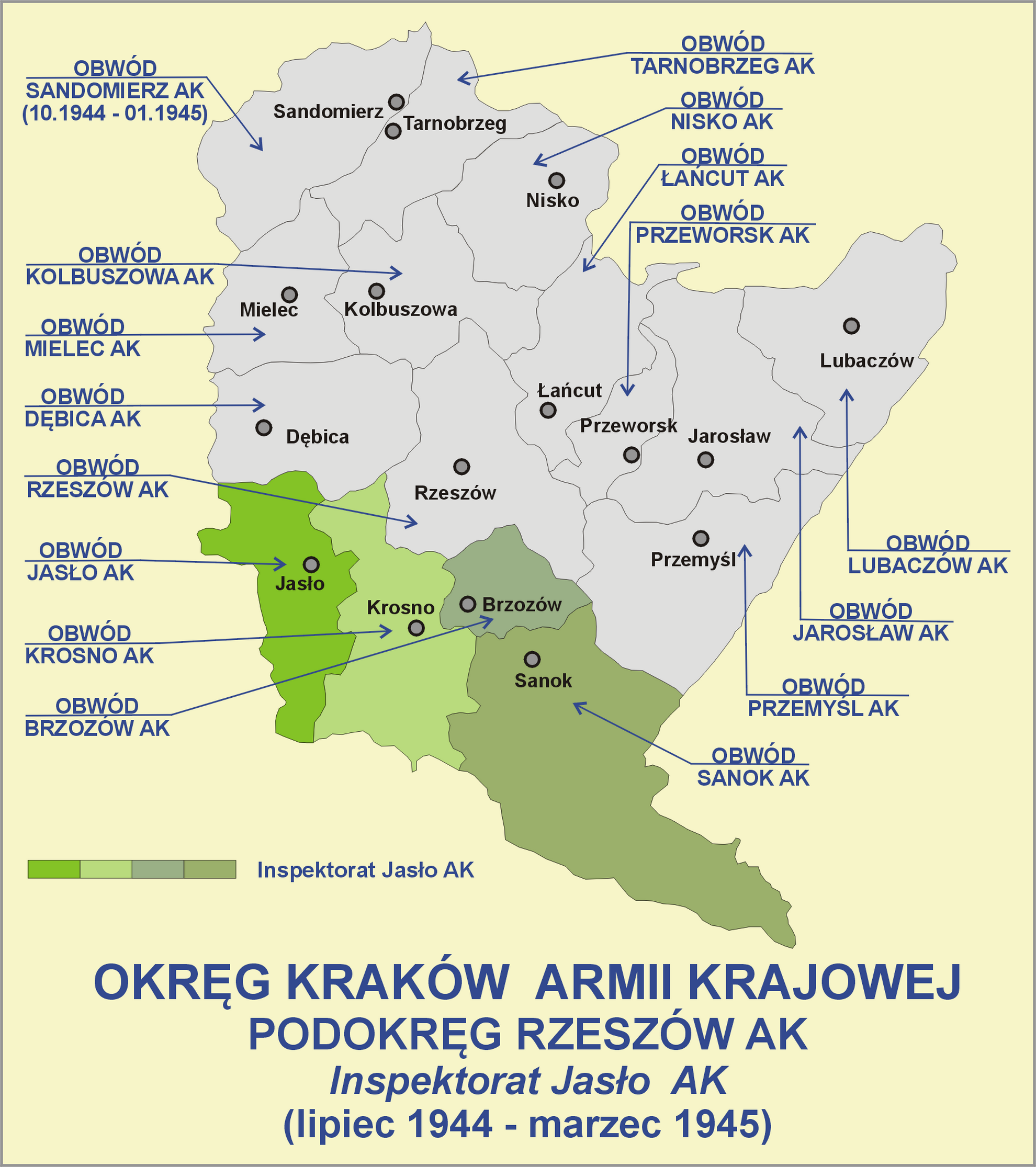 Okręg Kraków, Podokręg Rzeszów Armii Krajowej, Inspektorat Jasło AK (lipiec 1944 - marzec 1945)